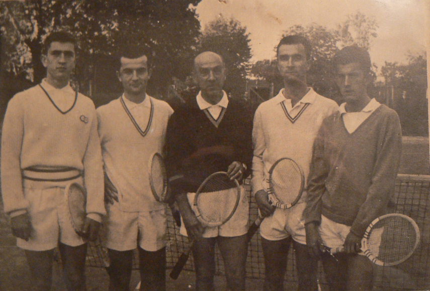 Famille Jauffret au club de Tennis de la Villa Primrose à Bordeaux, avec de gauche à droite: François Jauffret, Pierre Jauffret, André Jauffret, Jean-Paul Jauffret et Marc Jauffret. Années 1960